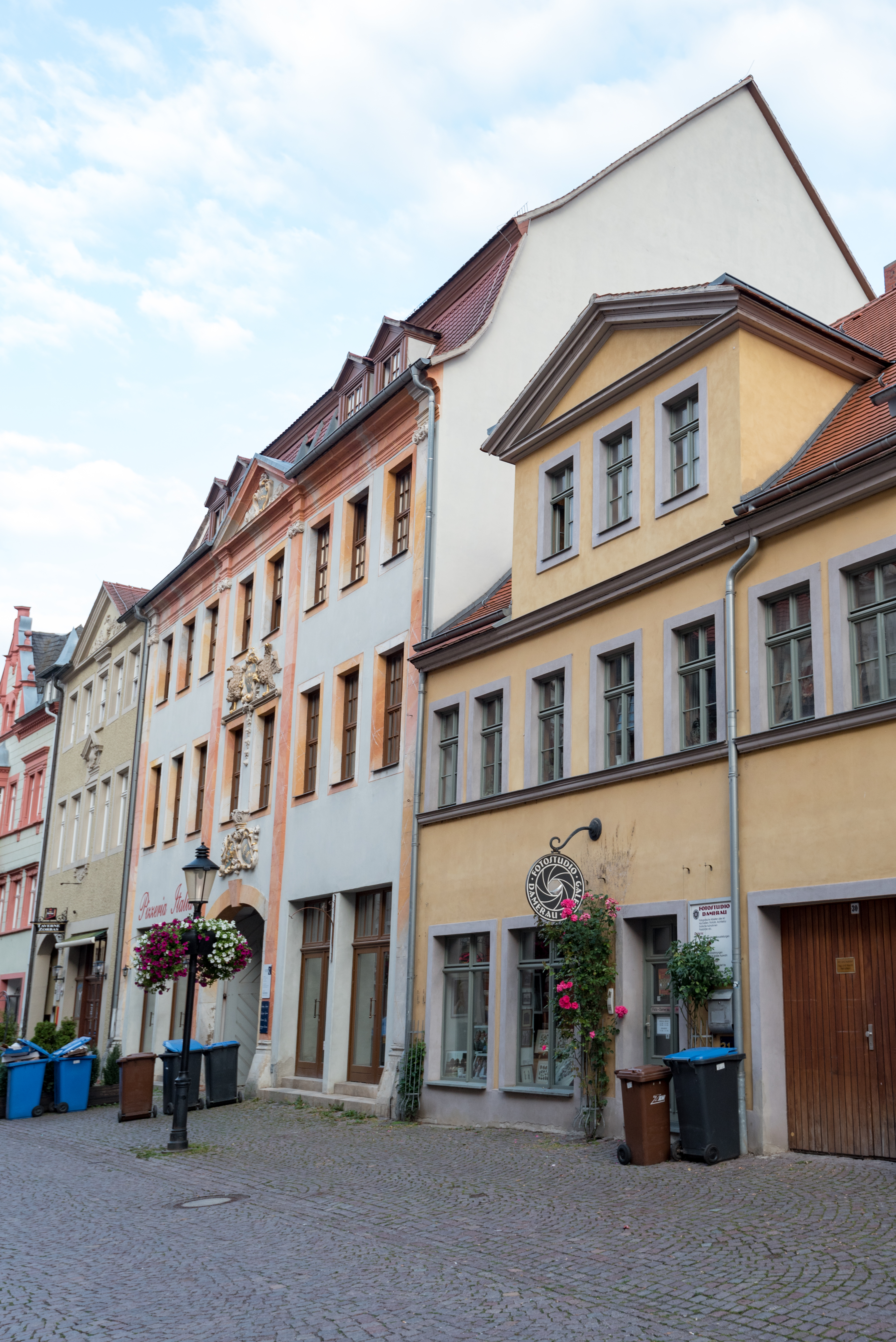 Naumburg (Saale), Salzstraße 32